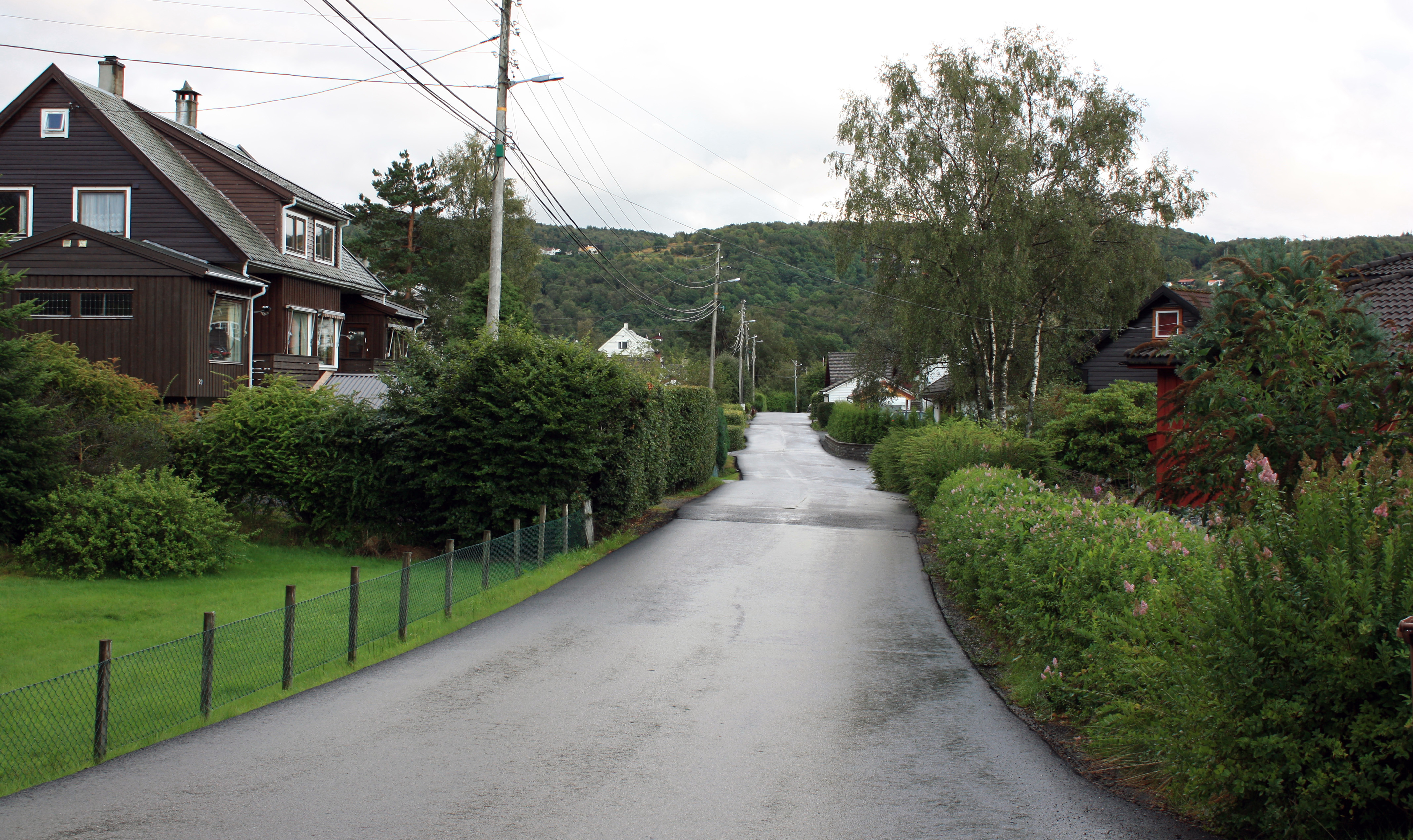 Sætervegen, Fana, Bergen.